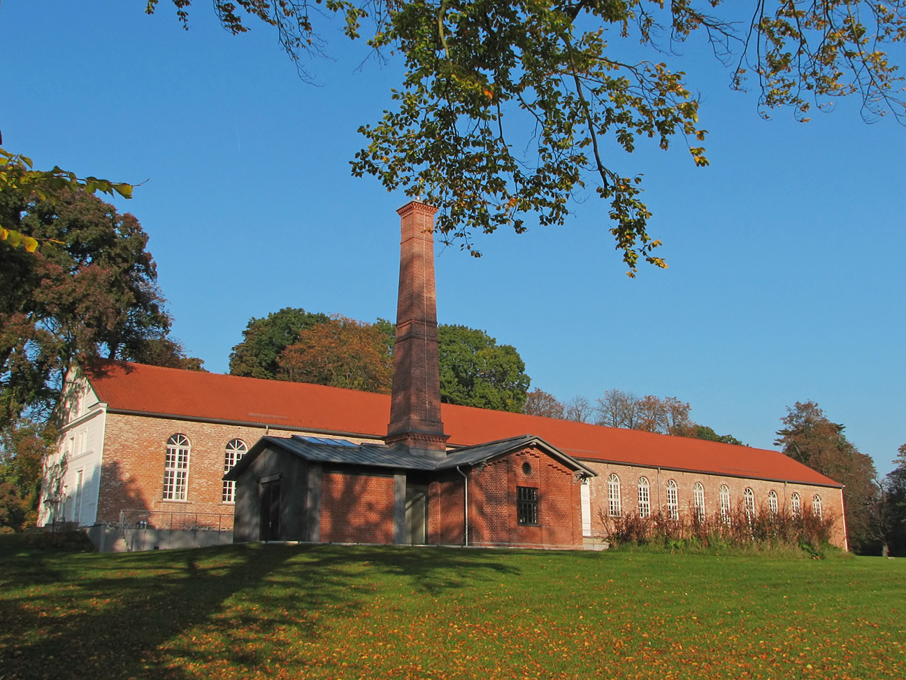 Beschreibung: Der Marstall im Stadtpark / Putbus / Germany Fotograf: Darkone, 12. Oktober 2005